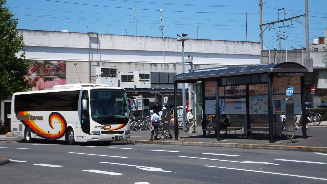 香川県丸亀市 丸亀駅前のバス停